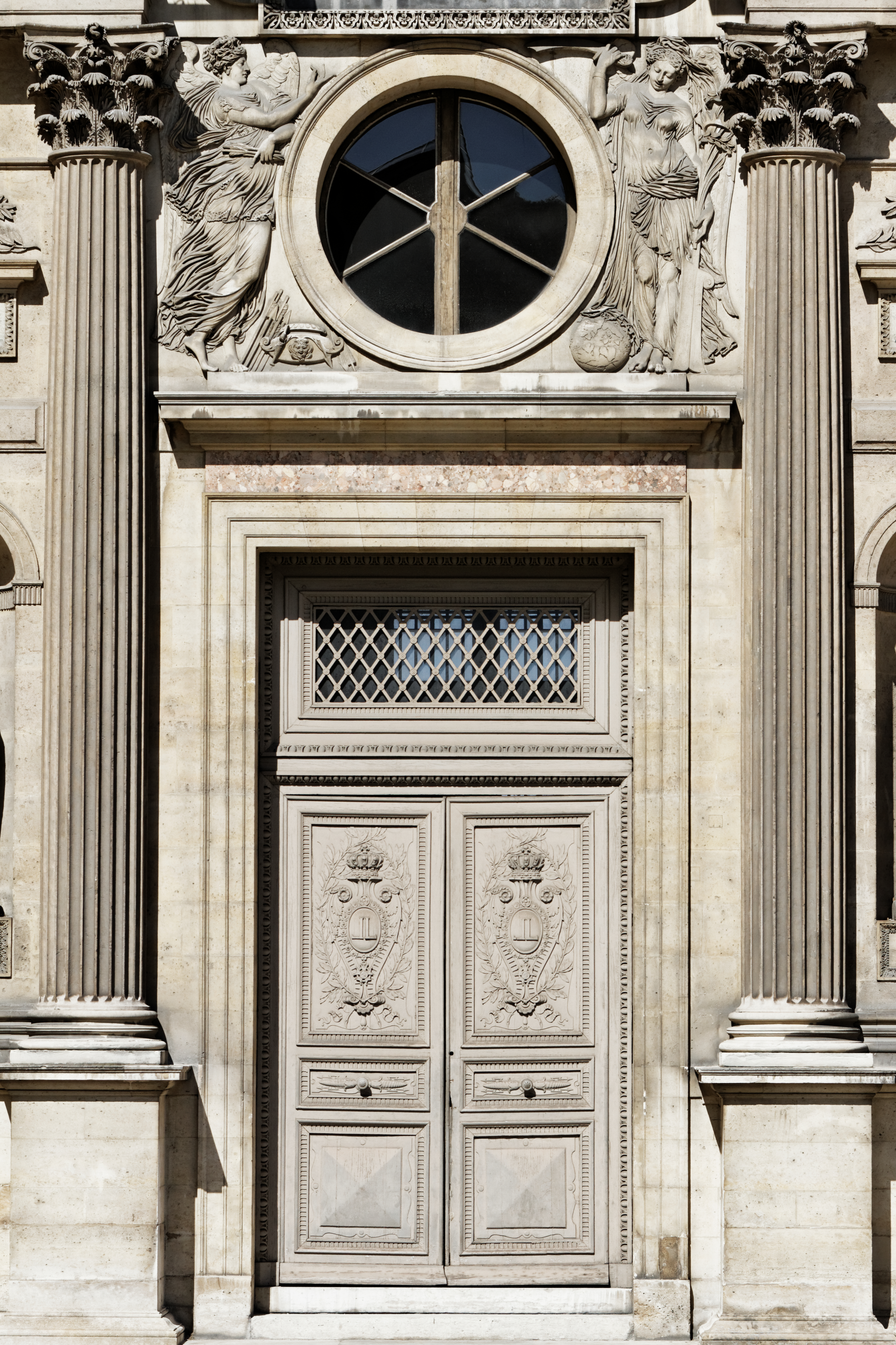 Jean Goujon: La Guerre et La Paix, Aile Lescot, Cour Carrée, palais du Louvre à Paris.